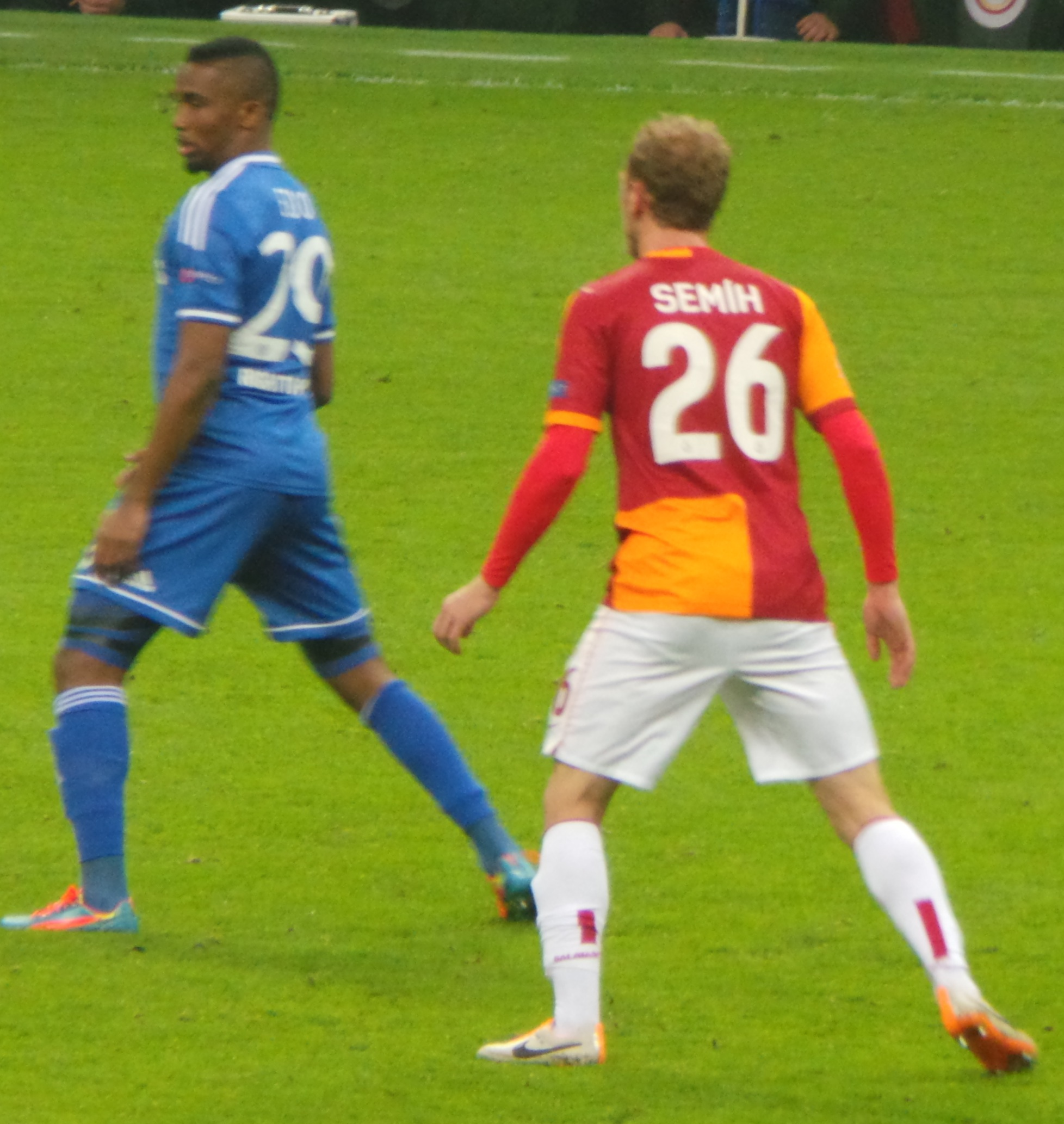 Eto with Kaya